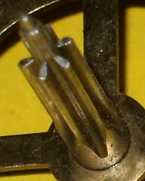 Volltrieb eines Uhrwerkes